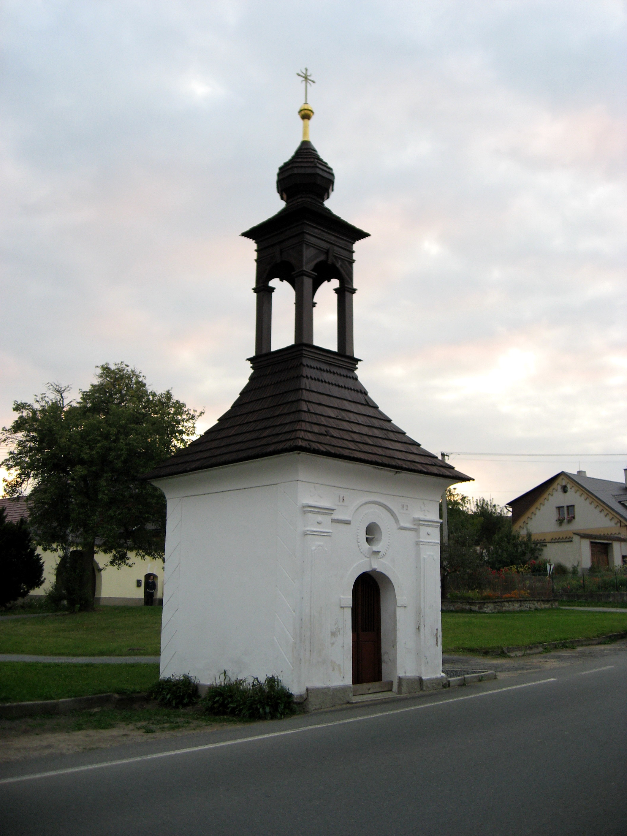 Křídla, kaplička